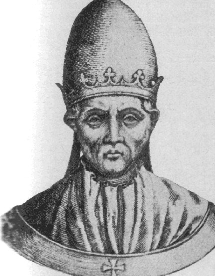 Coelestin V. Autor: :en:User:Aljodasch This image is in the public domain because its copyright has expired in the United States and those countries with a copyright term of life of the author plus 100 years or less.